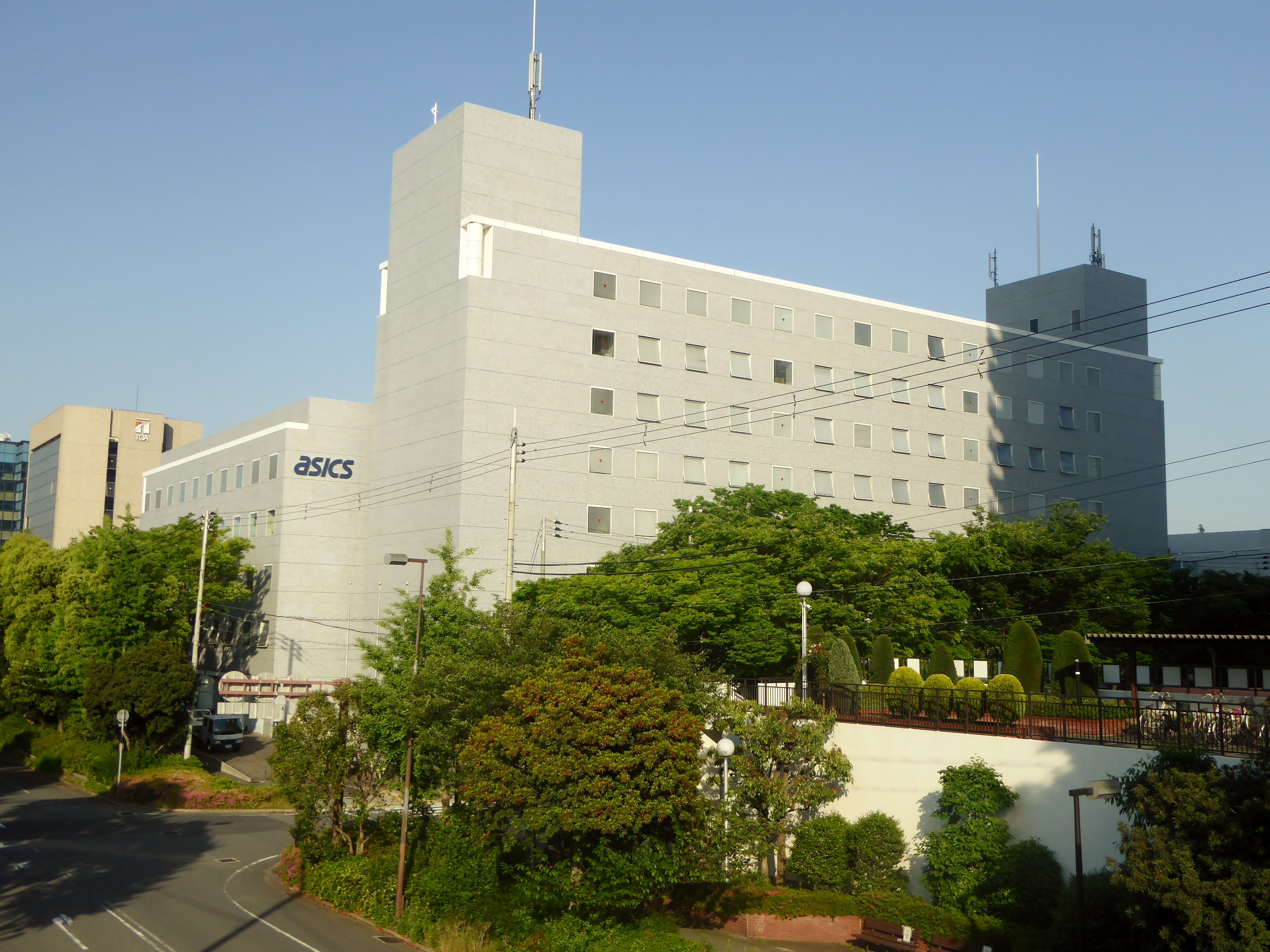 株式会社アシックス本社を撮影。